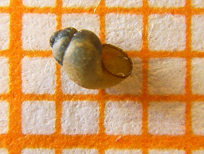 Bythinella reyniesii (= B. compressa) House on millimeter paper